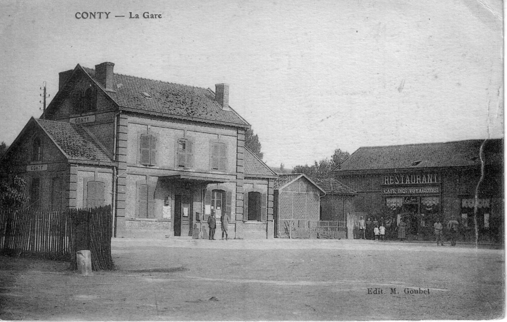 Carte postale ancienne éditée par Goubet : La gare de Conty : La Gare